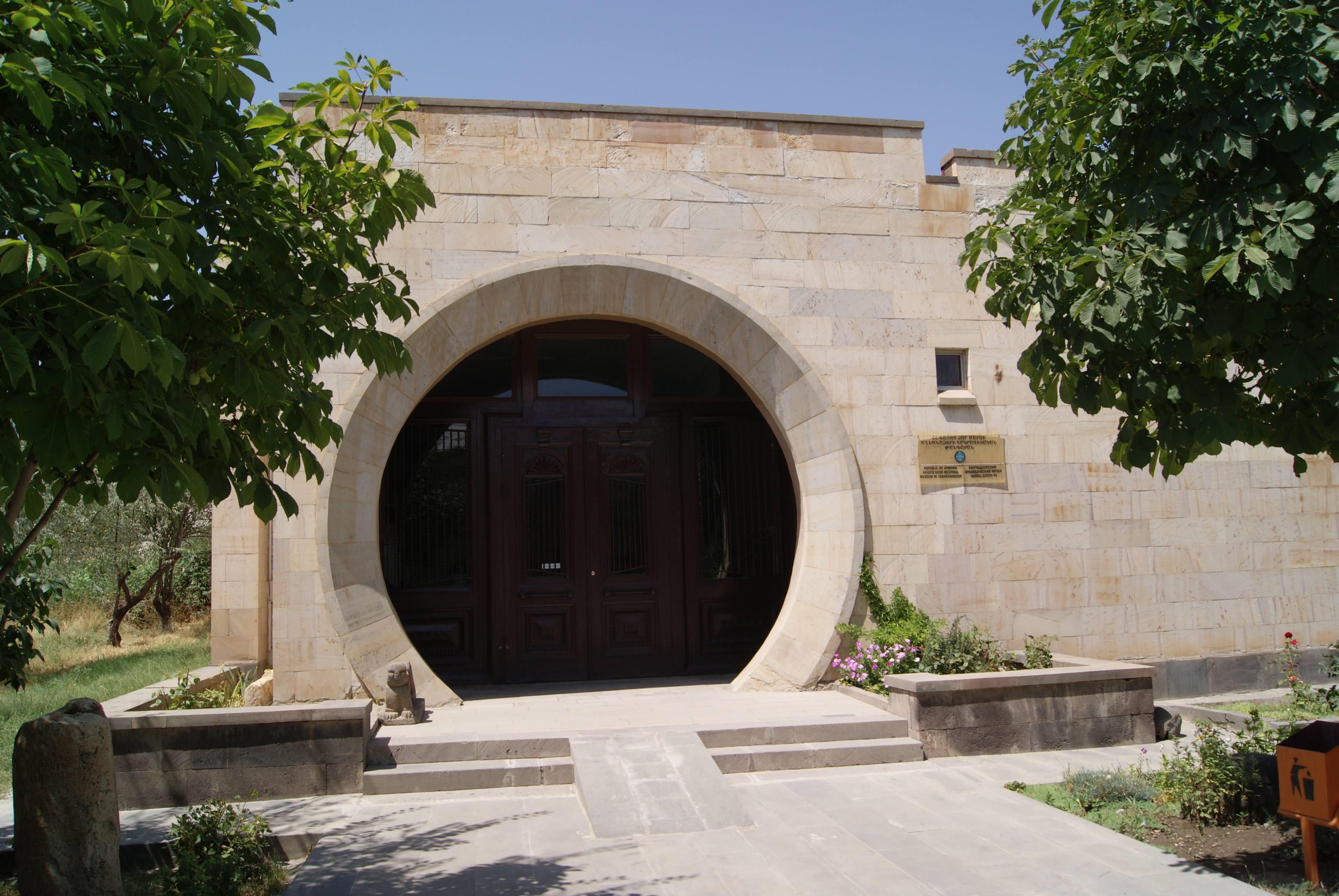 Թանգարանի շենք. Վայոց Ձորի երկրագիտական թանգարանը 1/8